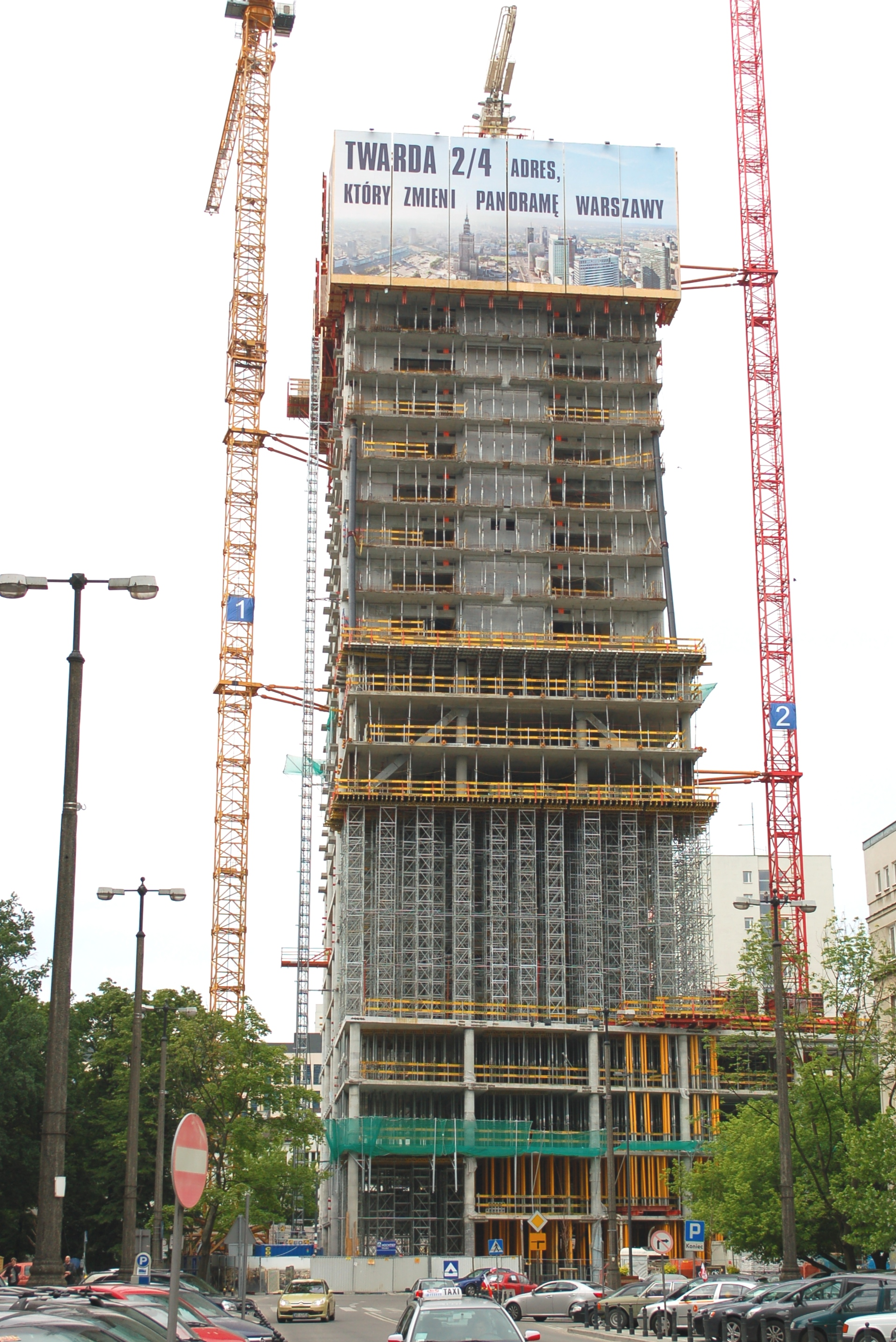 Twarda Tower Warschau